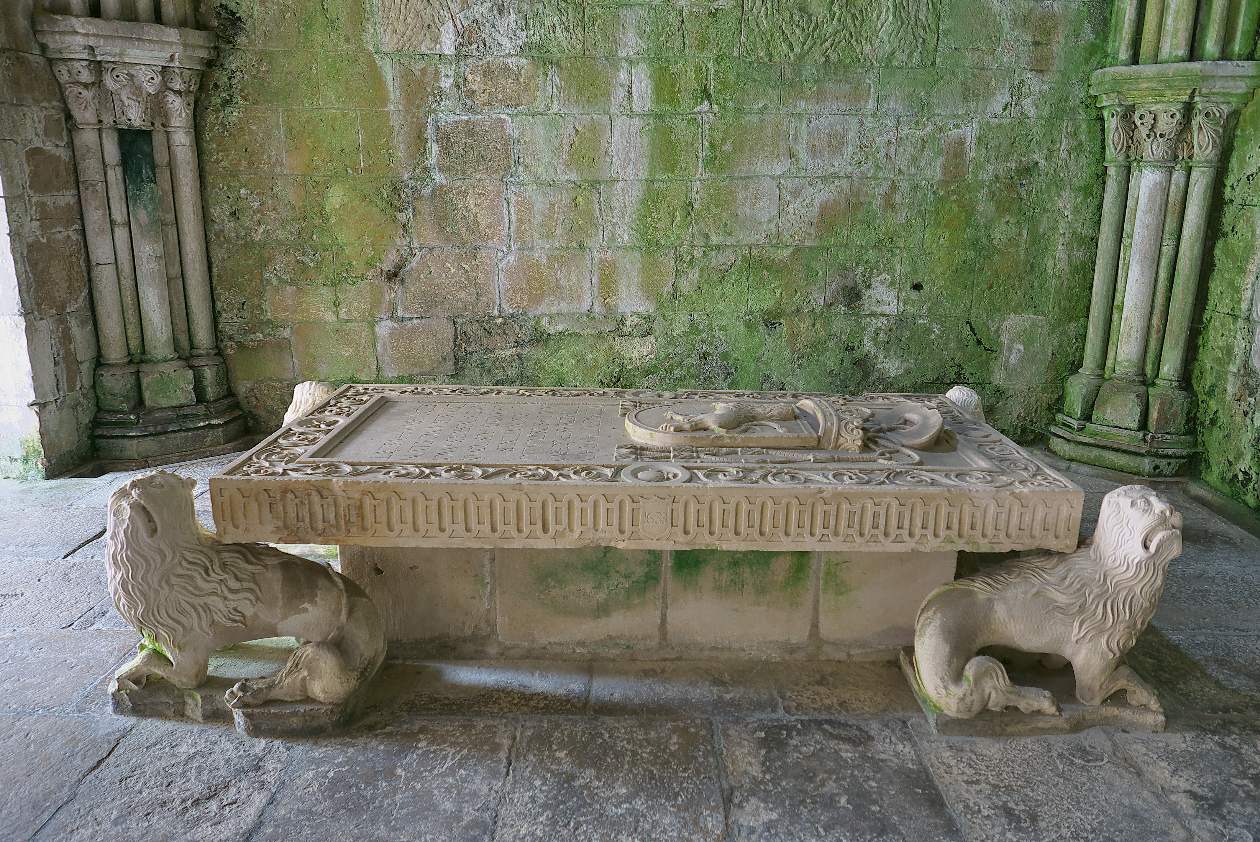 Antigua capilla de Santa Catarina, claustro de la Catedral Vieja de Coimbra. Sepulcro del obispo Afonso de Castelo Branco (†1615)